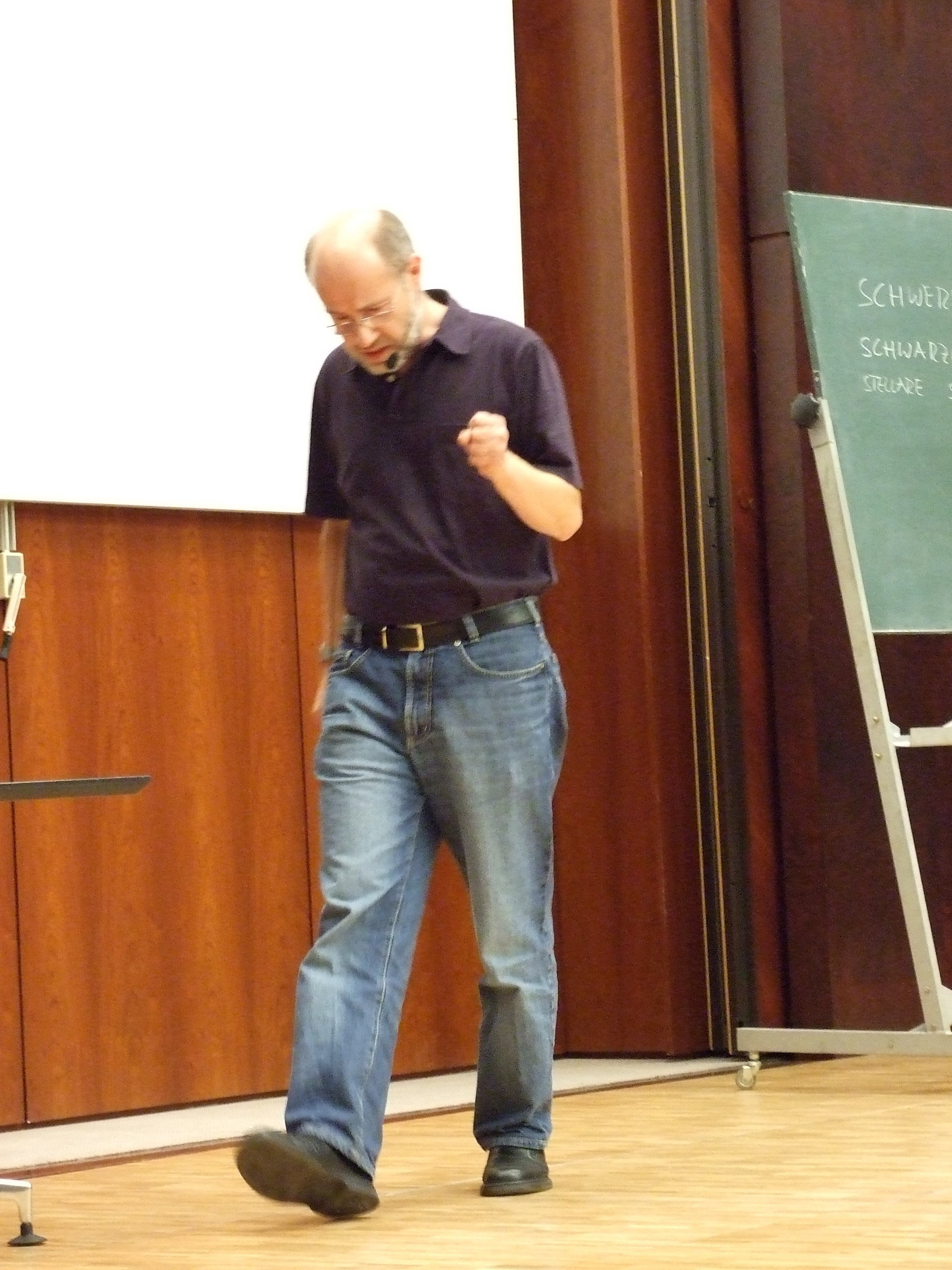 Harald Lesch, während seines öffentlichen Vortrages über schwarze Loecher, Materie und Energie, 2007 in Ffm